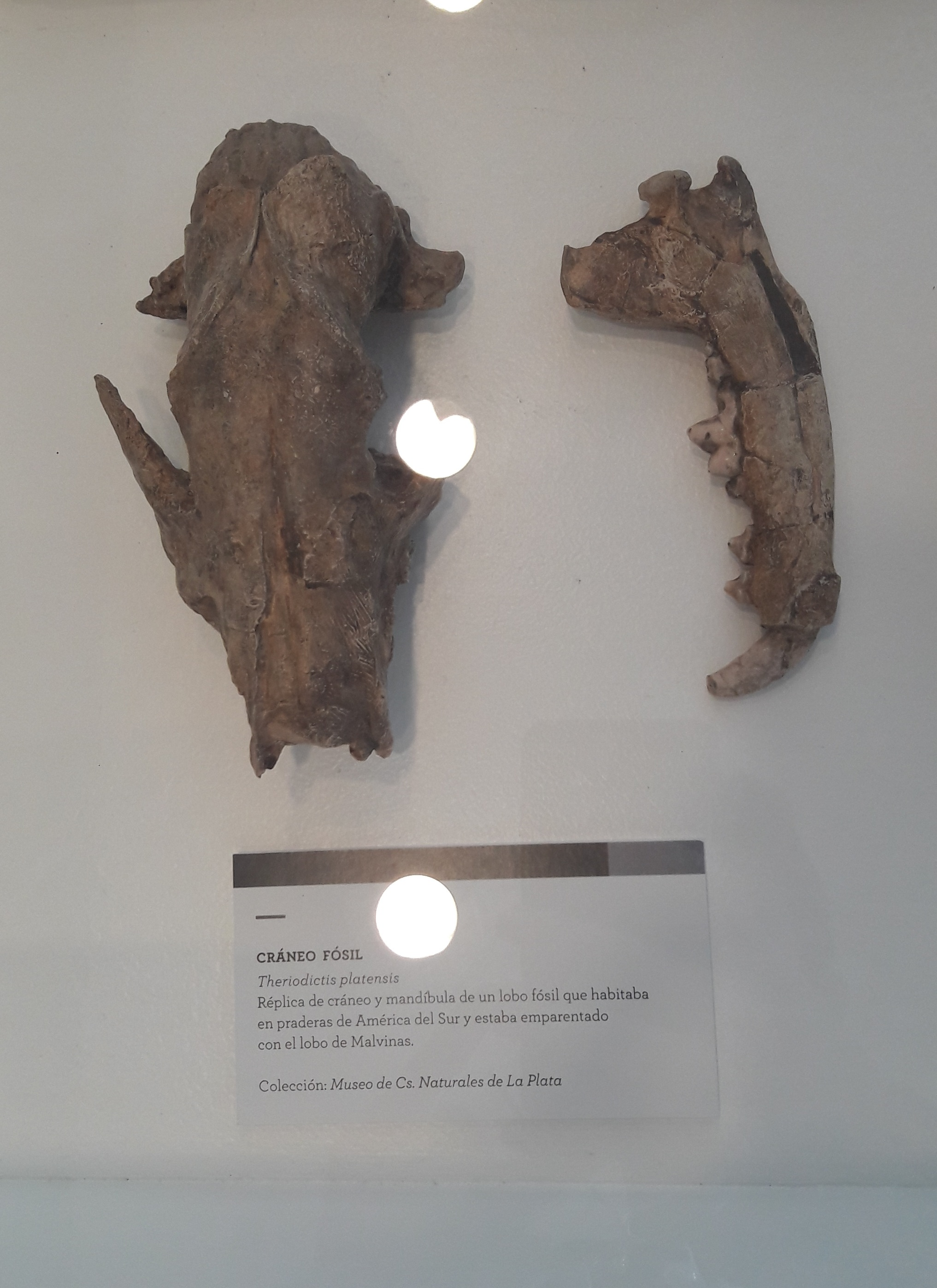 Cráneo fósil de Theriodictis platensis, pariente del lobo de Malvinas. Museo Malvinas, Núñez, Buenos Aires, Argentina.